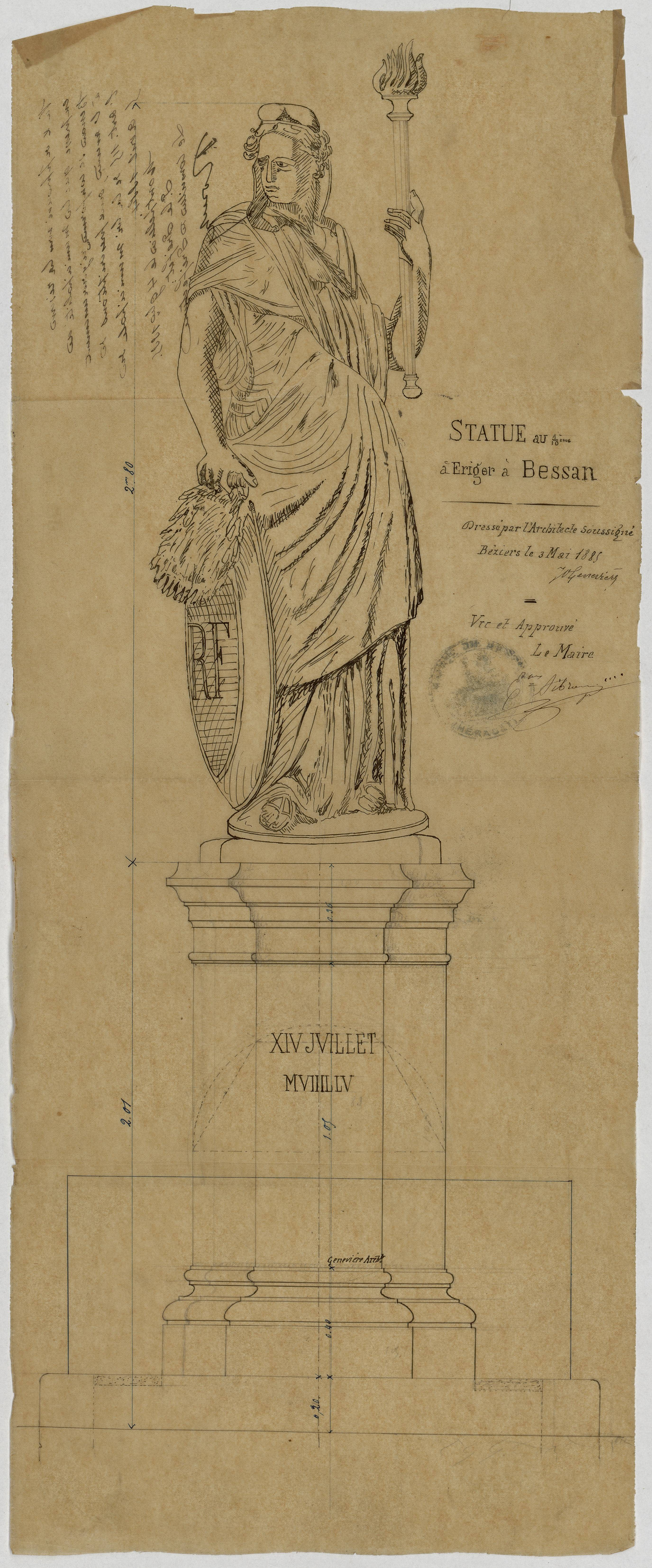 Bessan. - Statue de la République : élévation.